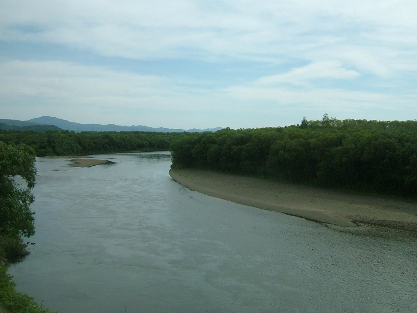 宗谷本線の列車から撮影